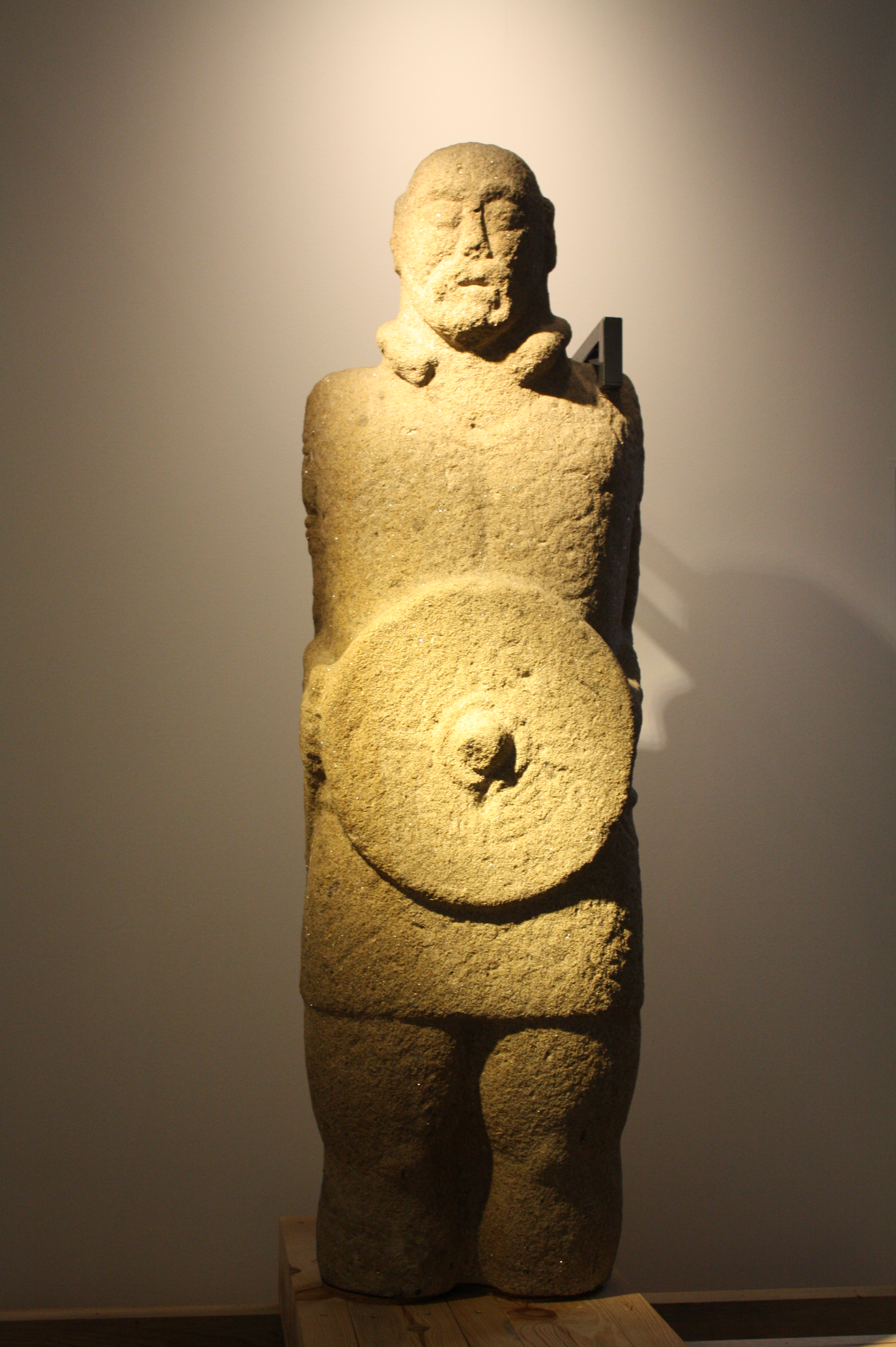 Guerreiro galaico-lusitánico de Lesenho (s. I dC), exposto no Museo Nacional de Arqueoloxía de Lisboa